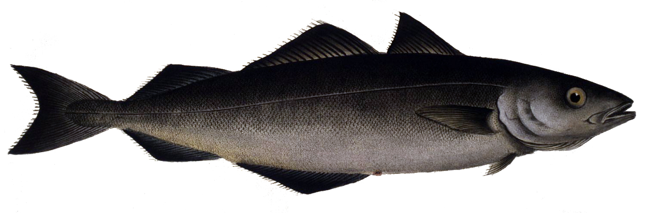 Pollachius virens